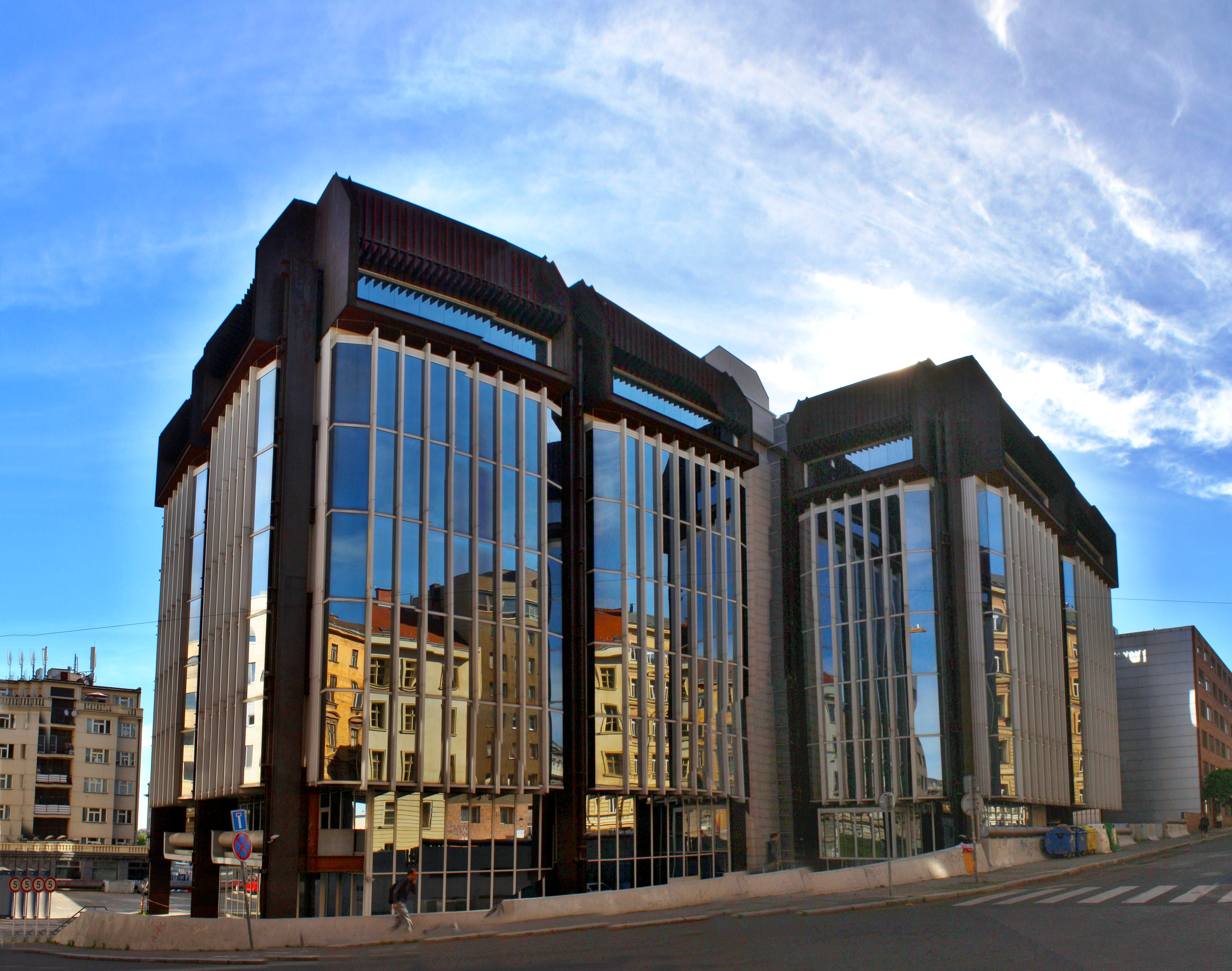 Hlavní budova Transgas Praha